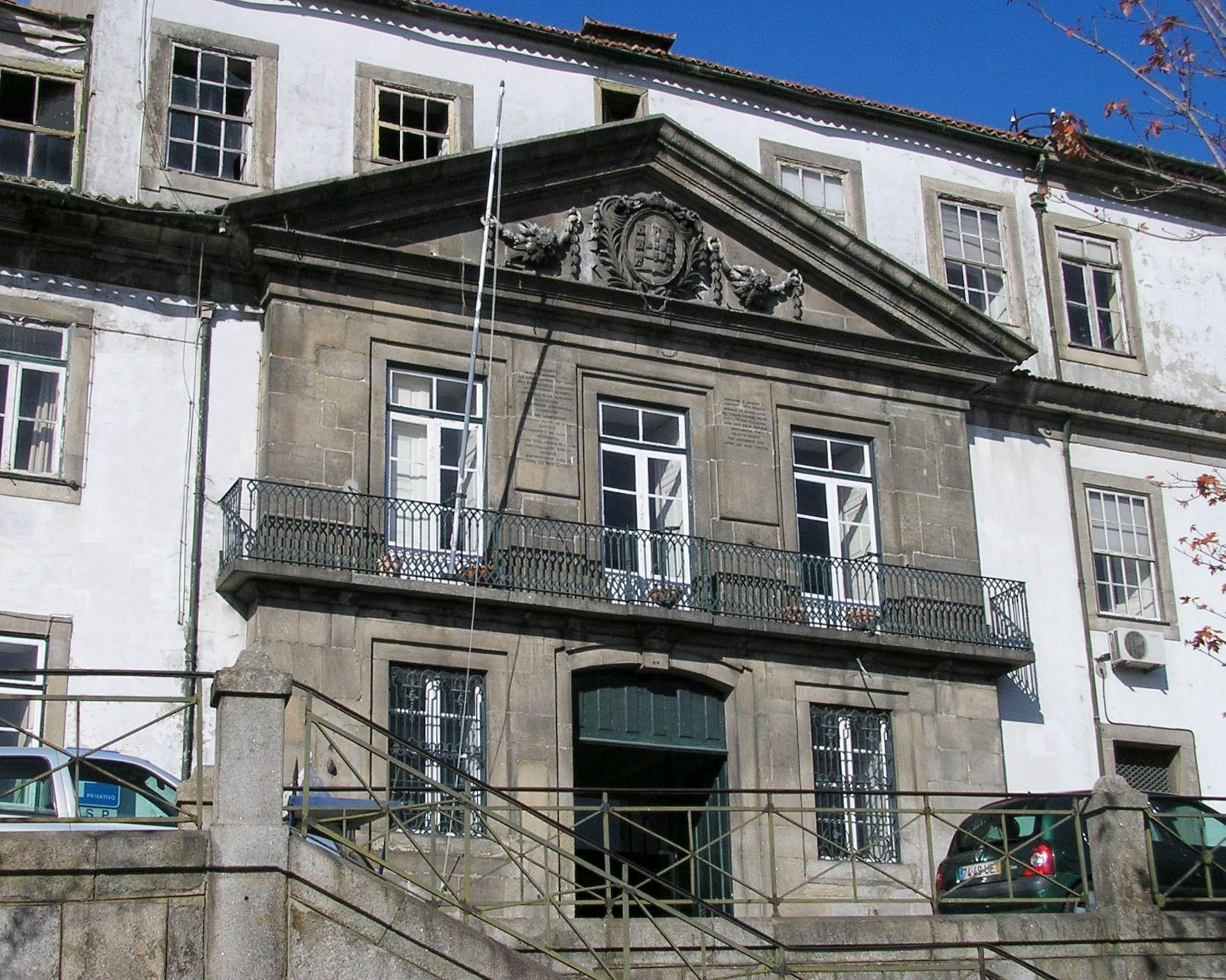 "Casa Pia" old building / Antigo edifício do Governo Civil in Porto, Portugal